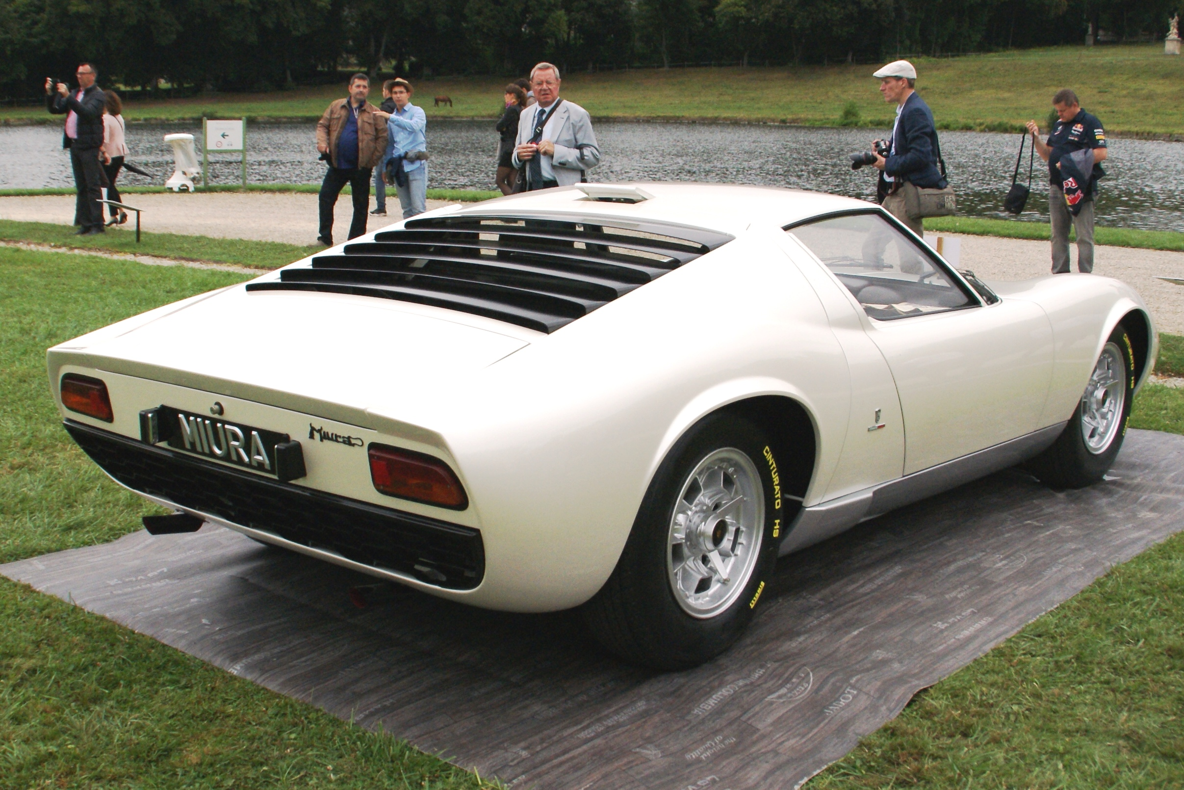 Lamborghini Miura (1967)